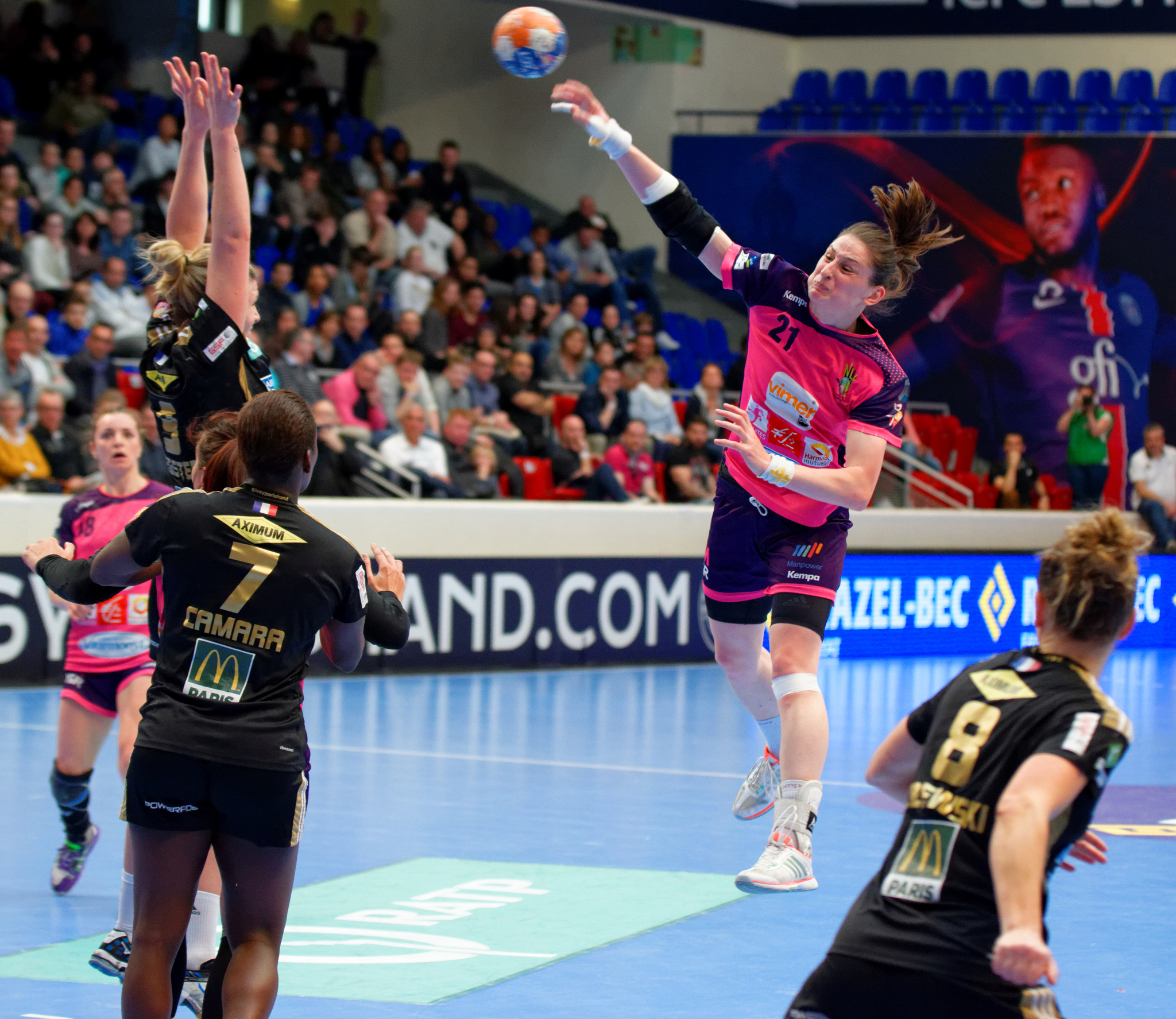 Jovana Stojlkovic Lors du match retour des playoffs Issy Paris Hand / Nantes LAHB, le 17 avril 2016 à Coubertin (Paris).